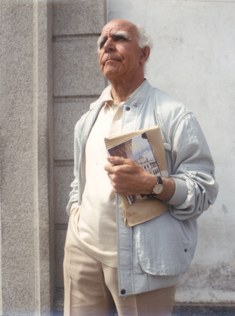 Historiador de arte Túlio Espanca.